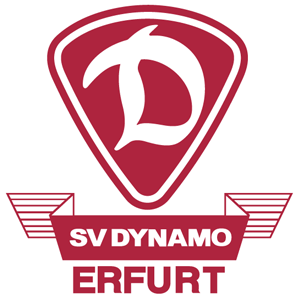 Logo der Bezirksorganisation Erfurt der Sportvereinigung Dynamo (1966-1990). In der DDR ist die SV Dynamo nicht in Bundesländer, sondern in Bezirke eingeteilt worden, da es keine Bundesländer gab. In jedem Bezirk ga es daher eine Bezirlsorganisation der SV Dynamo, worin die Sportgemeinschaften ... eingegliedert wurden.